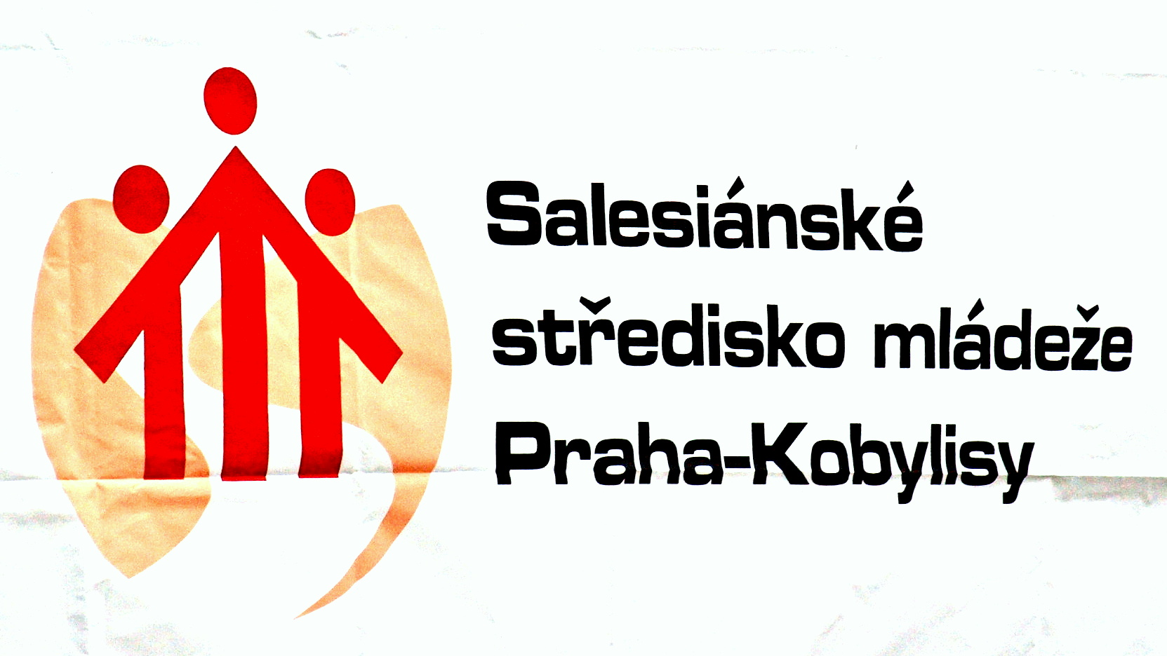 Salesiánské středisko Praha